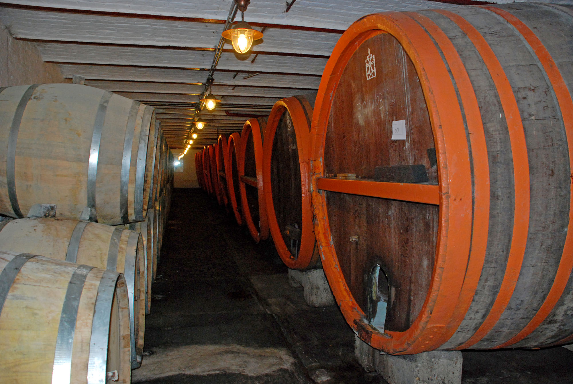 Brouwerij Timmermans